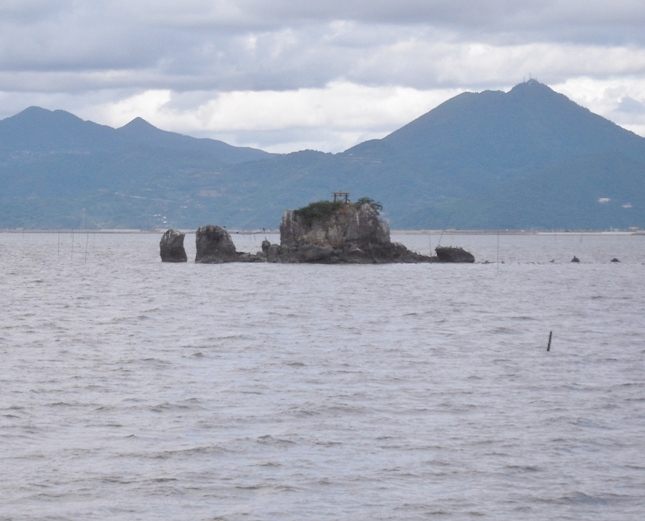 有明海に浮かぶ風流島（たわれじま）〔熊本県宇土市〕